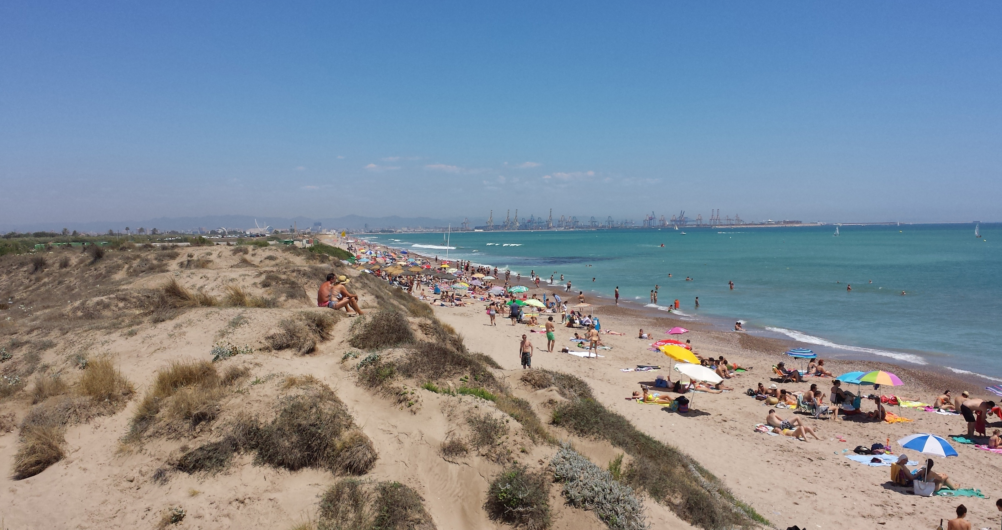 Au loi, les grues du port